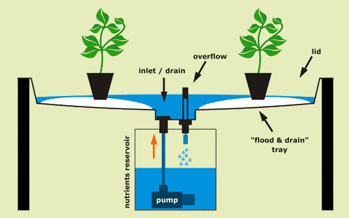 flood-and-drain-SYSTEM, Ebbe-und-Flut-SYSTEM